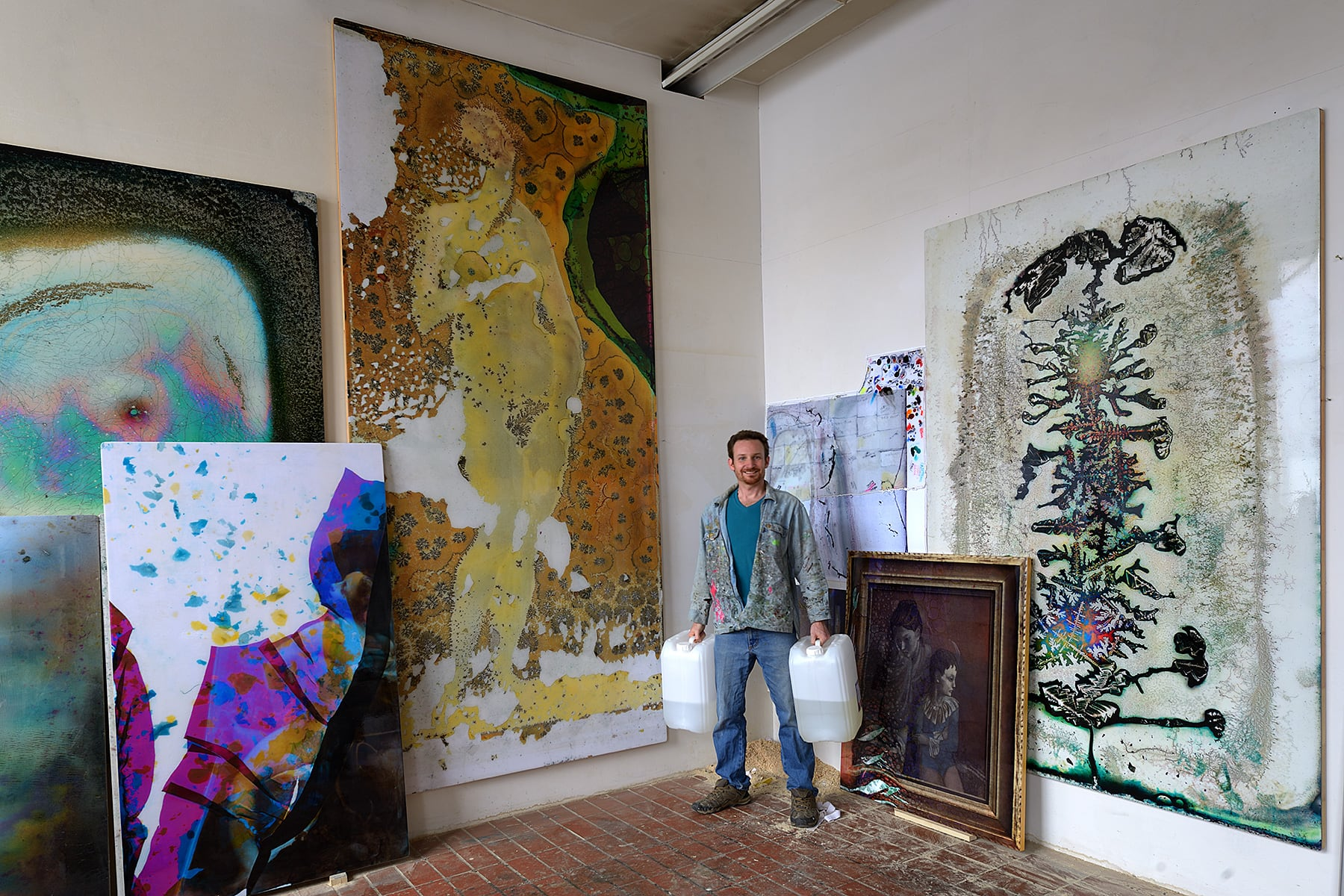 Wolfgang Ganter vor "Sandro Botticelli Venus Pudica" und anderen Werken